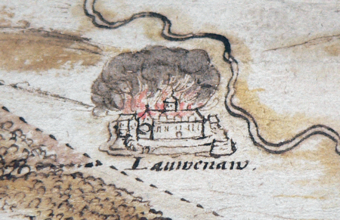 Belagerung Lauenau in Stiftsfehde